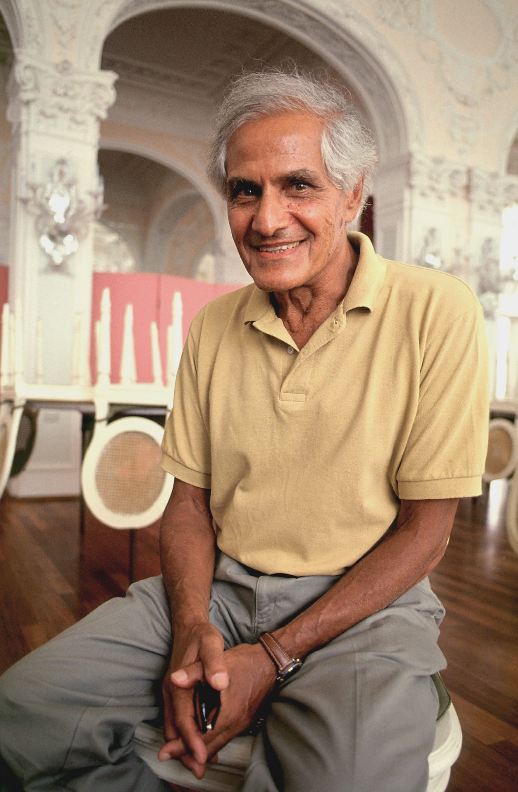 Il regista Nikos Papatakis